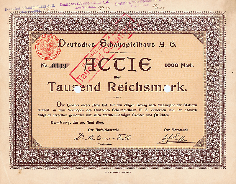 Aktie über 1000 Mark der Deutschen Schauspielhaus AG vom 20. Juni 1899